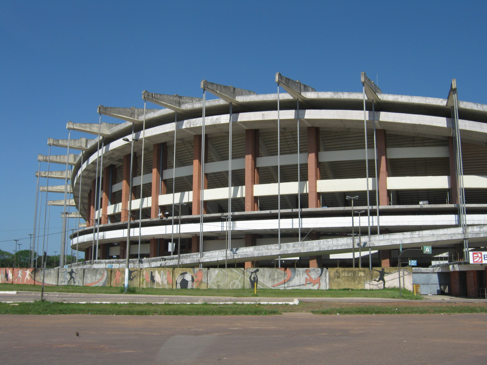 Estádio Verdão